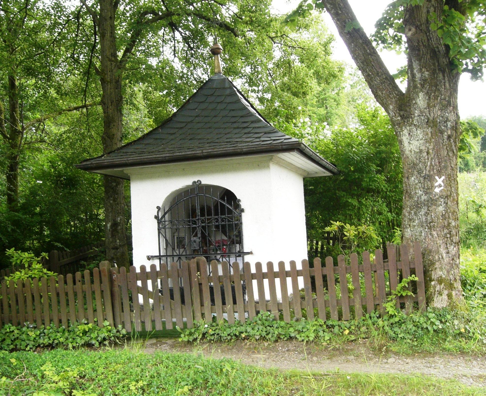 denkmalgeschütztes Heiligenhäuschen an der Steppel oberhalb von Meggen